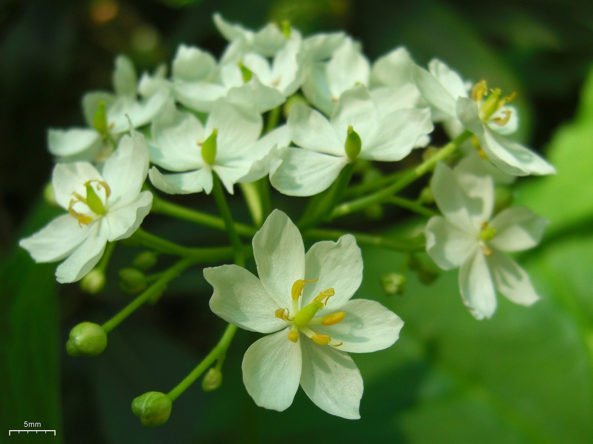 Diphylleia cymosa 20100506.3 Great Smoky Mountains, NC